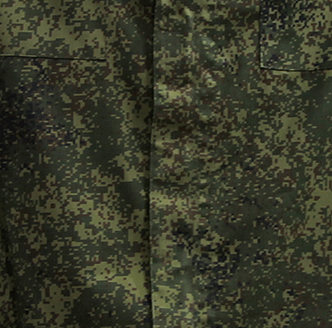 Примеры использования одежды из комплекта ВКБО (Some examples from VKBO military uniform kit)